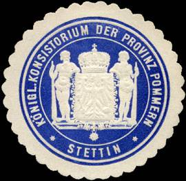 Sealing stamp Title: Königliche Konsistorium der Provinz Pommern - Stettin Description: blau, weiß, geprägt Place: Stettin size: 4 cm